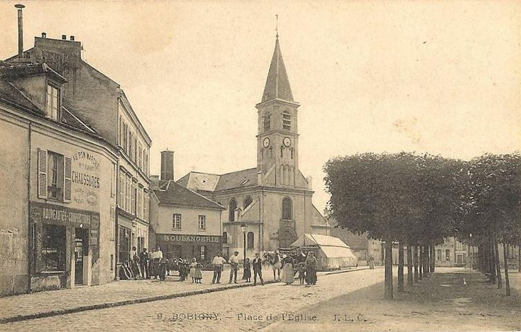 Bobigny, place de l'Eglise